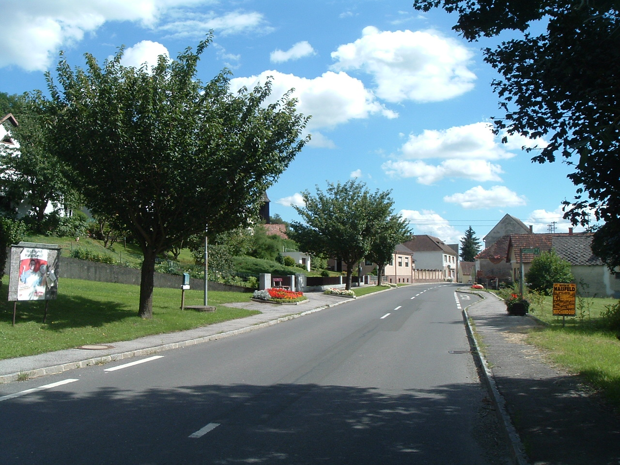 Altschlaining, Burgenland, Austria